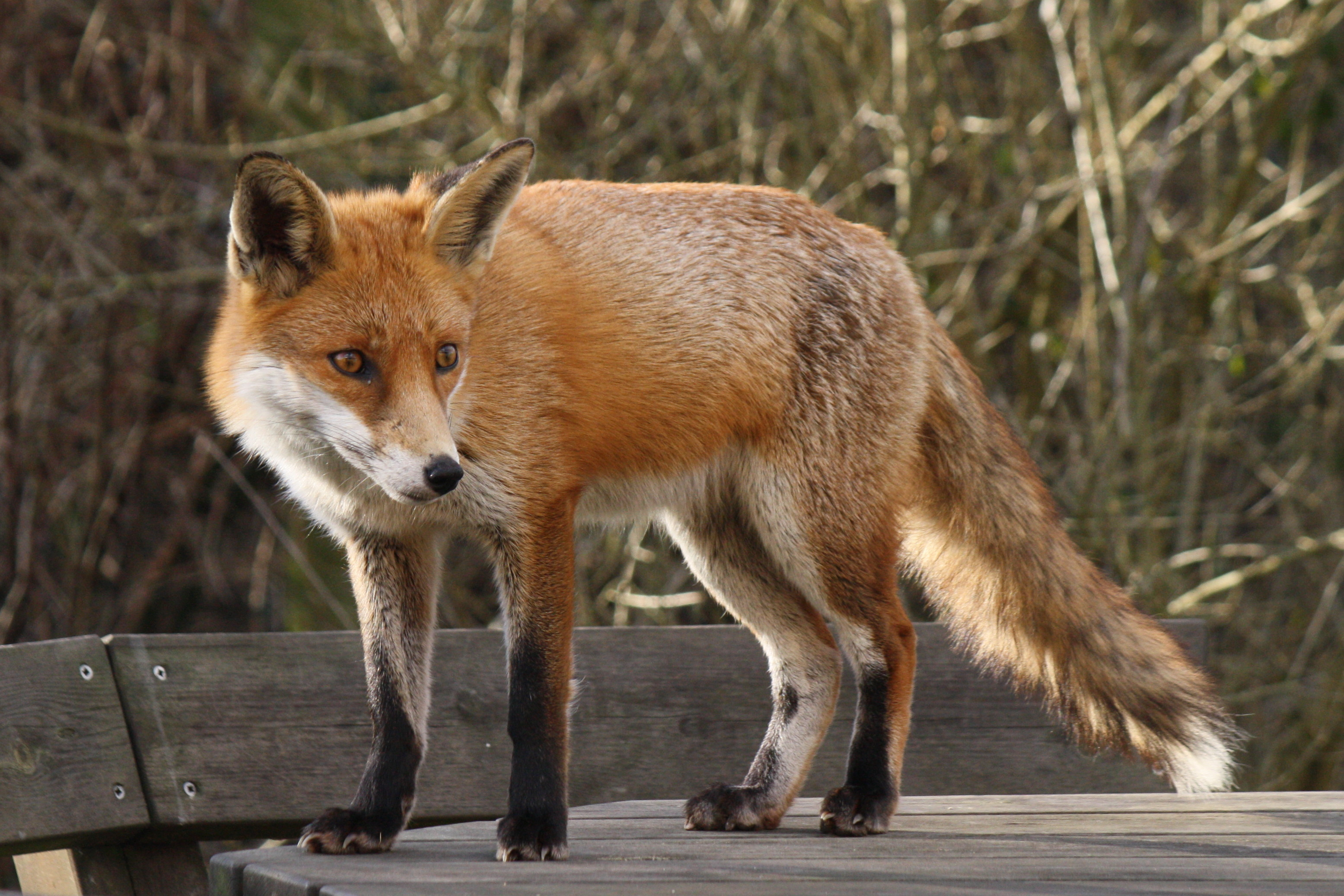 zdjęcie zwierzęcia z kitą (lis,) English | Polski | +/−